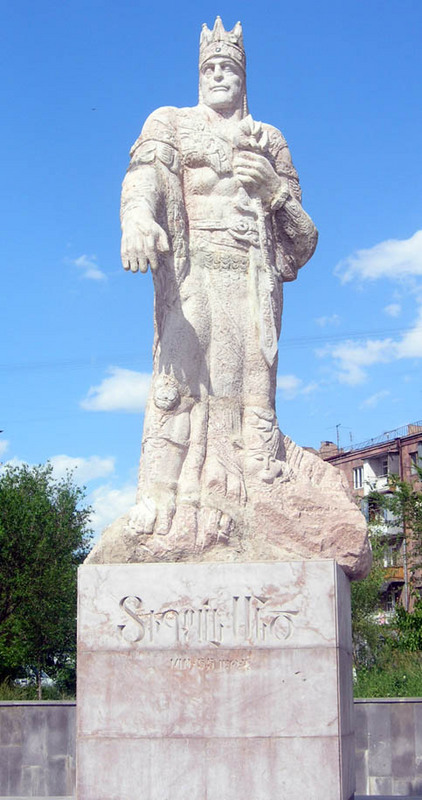 Tigranes el Grande, monarca de Armenia Armenian king, Tigran the great